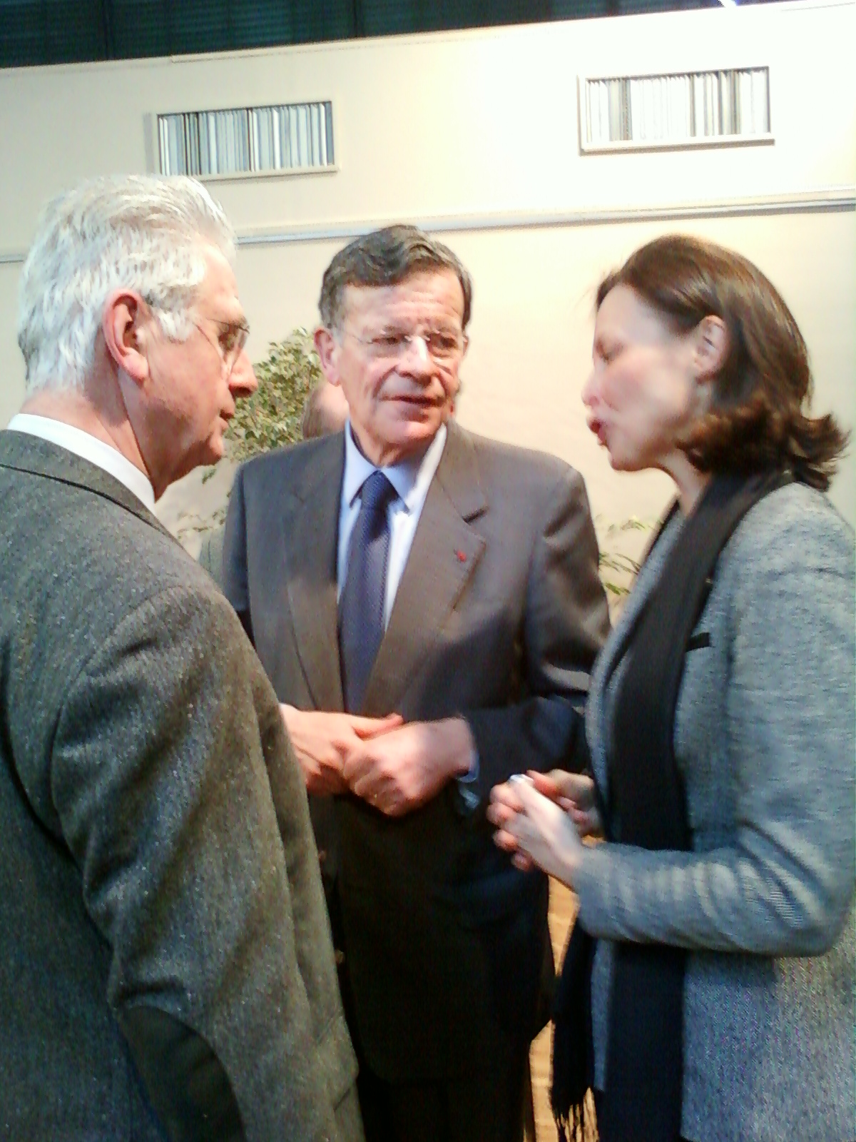 François Kosciusko-Morizet (maire de Sèvres depuis 1996)